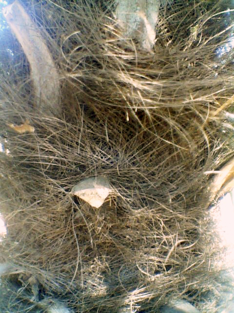 シュロの樹皮 撮影データ 撮影地: 関東地方 撮影年月日: 2005年3月下旬 撮影者: Koba-chan ライセンス: GFDL